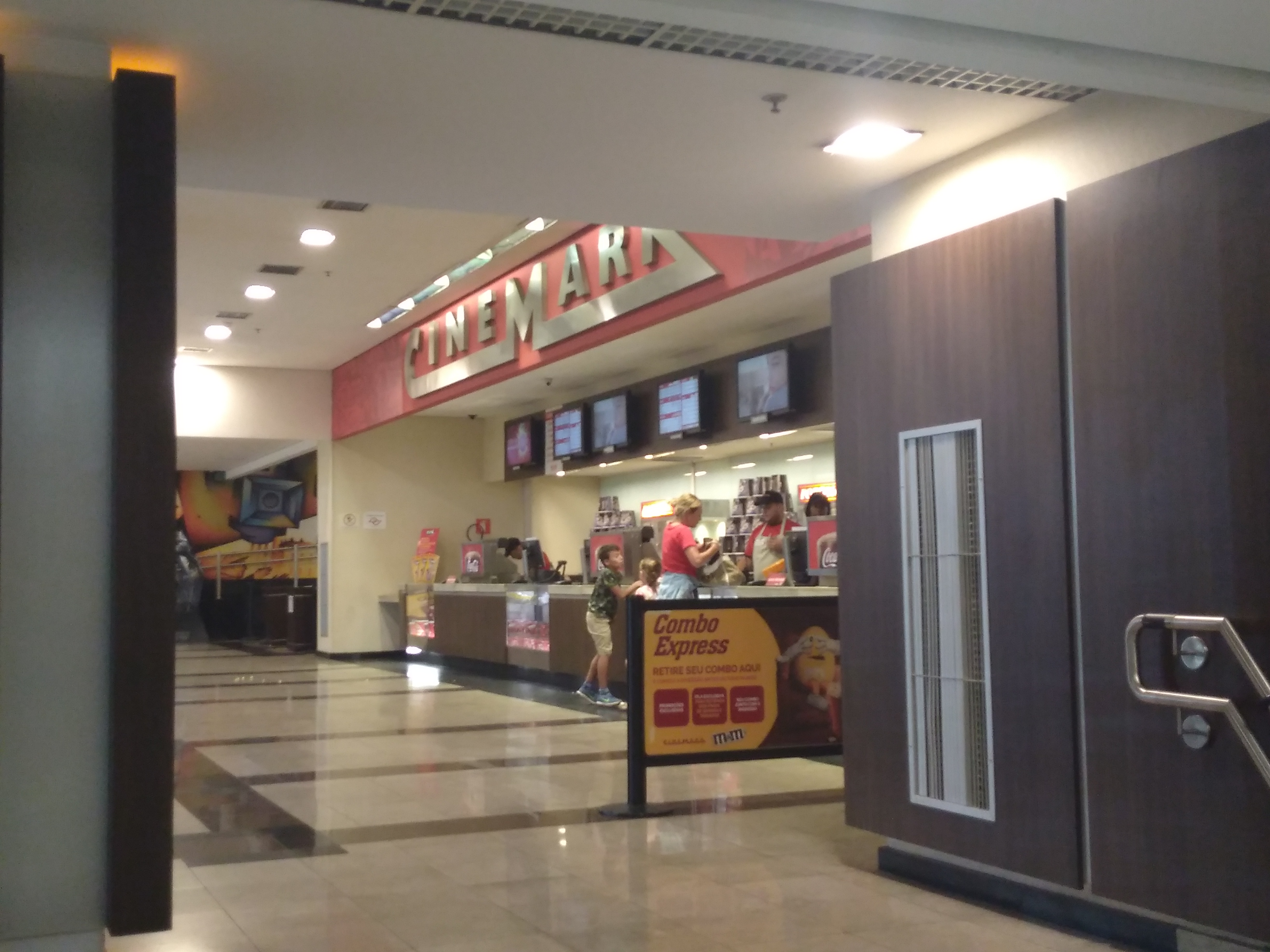 Vista lateral da entrada do Cinemark Pátio Paulista, de São Paulo, SP